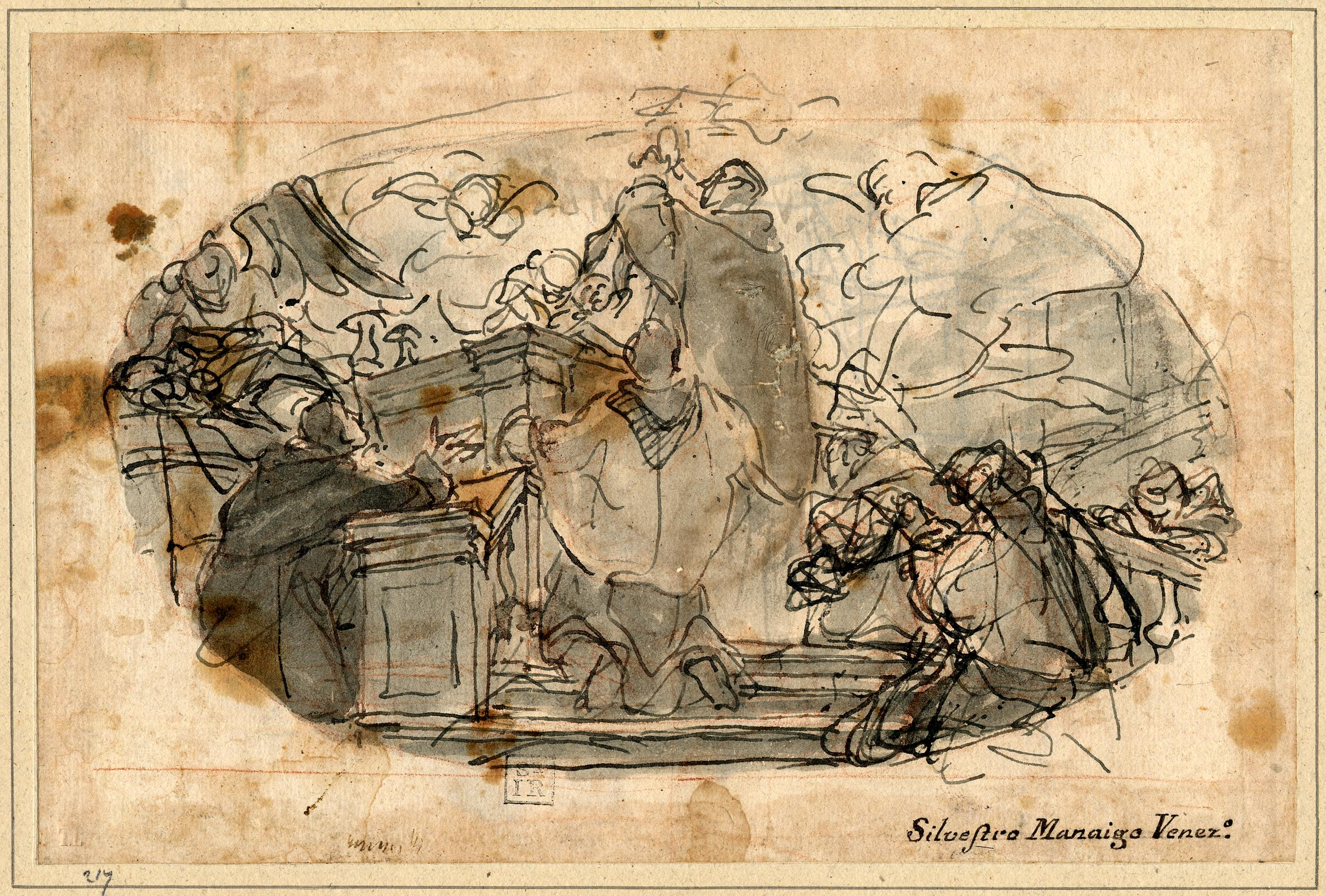 Silvestro Manaigo, Prima messa di san Filippo Benizi, schizzo per la tela scomparsa già nella chiesa dei Servi a Venezia